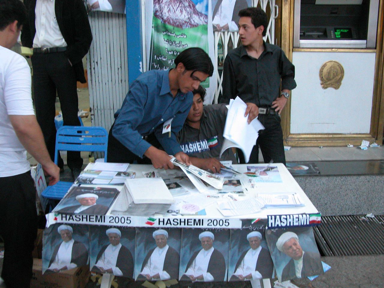 Wahlkampfstand für Akbar Hashemi Rafsanjani bei den iranischen Präsidentschaftswahlen 2005